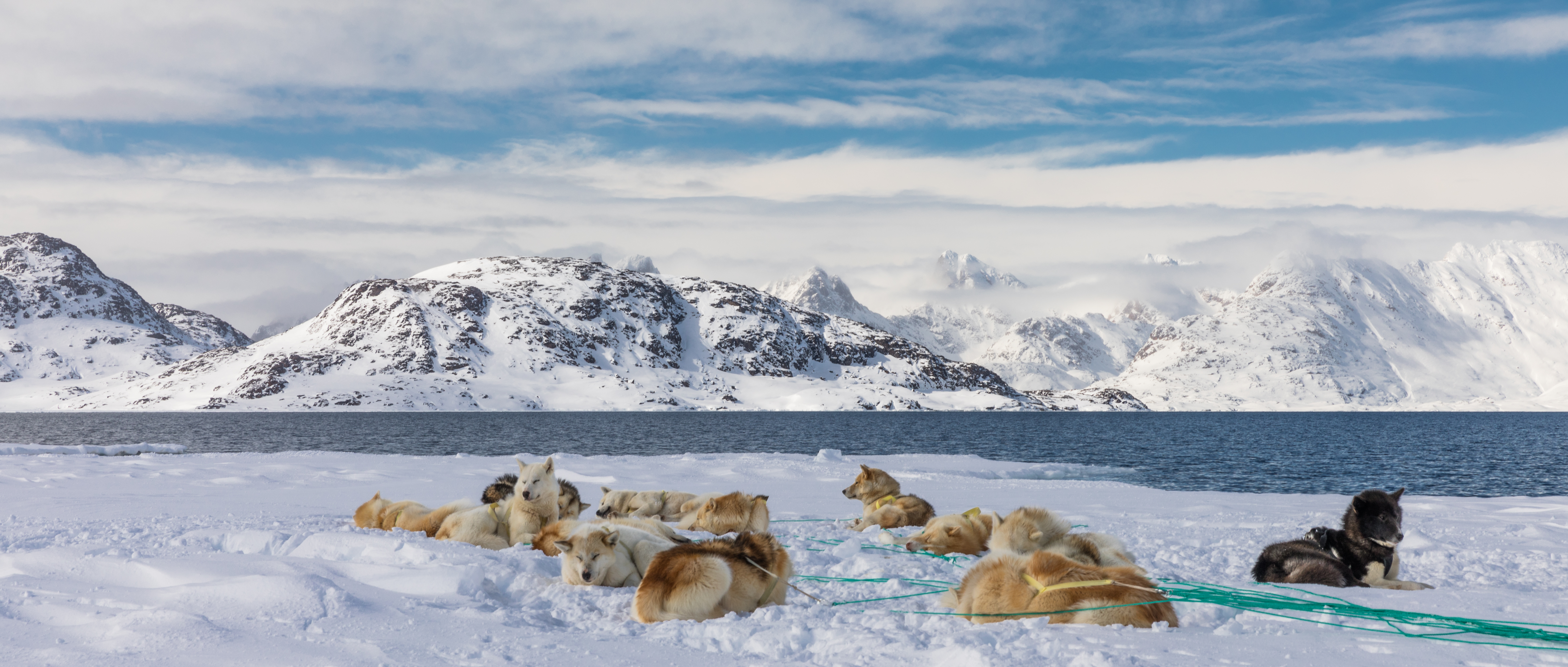 Greenland_377.jpg